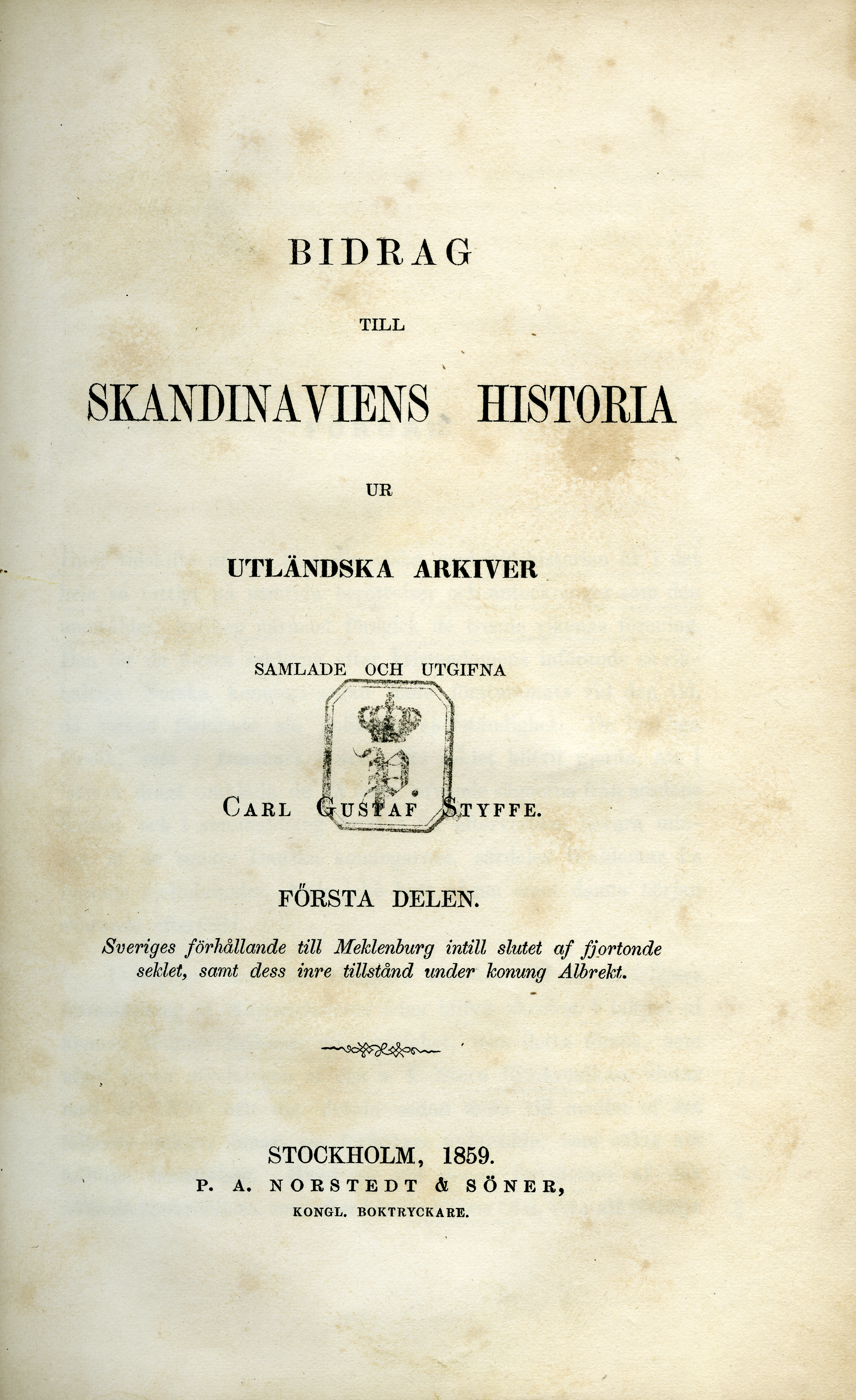 Titlebladet till Bidrag till Skandinaviens historia ur utländska arkiver Första delen (1859) av Carl Gustaf Styffe.